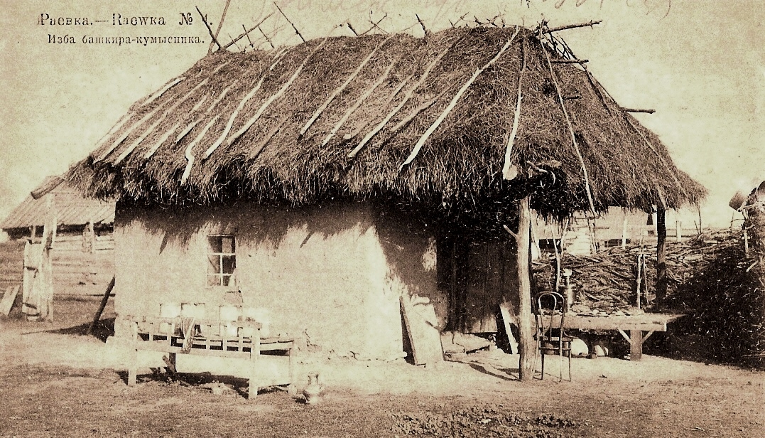 Башкортостан. Раевка Уфимской губернии. Изба башкира- кумысника